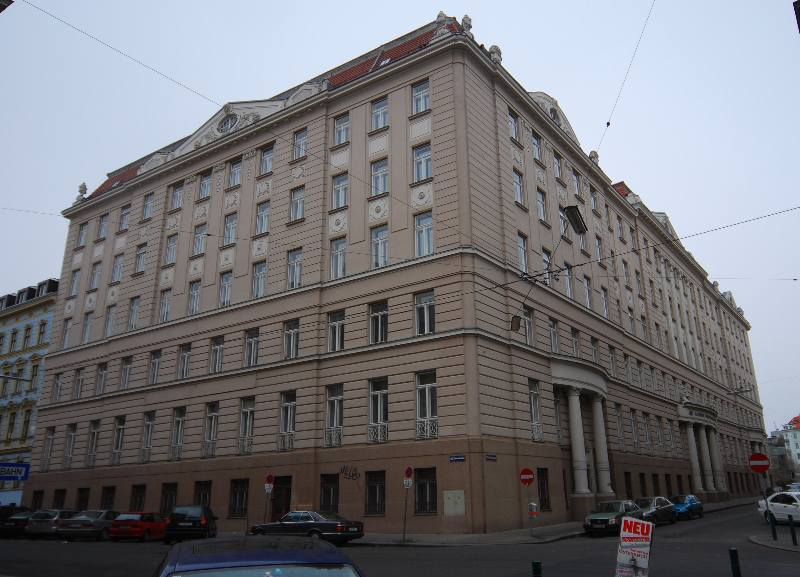 Verwaltungsgebäude der AUVA in der Webergasse 2 - 6, in dem das erste Unfallkrankenhaus Wiens untergebracht war.